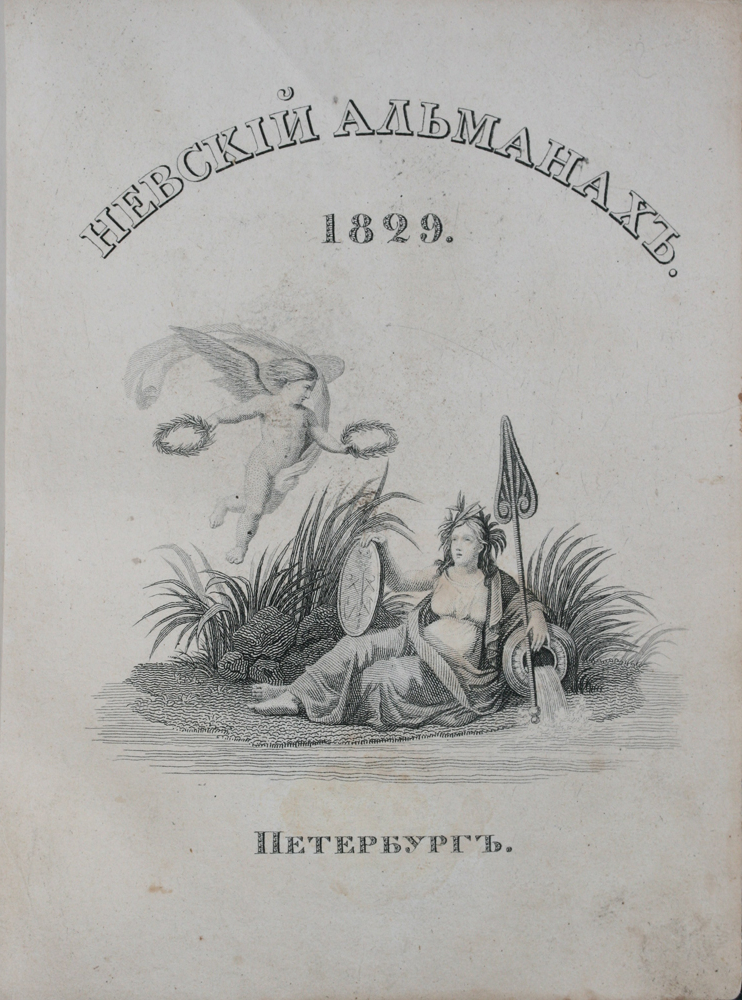 Гравированный титульный лист литературного альманаха "Невский альманах" на 1829 год, изданного Е. В. Аладьиным.